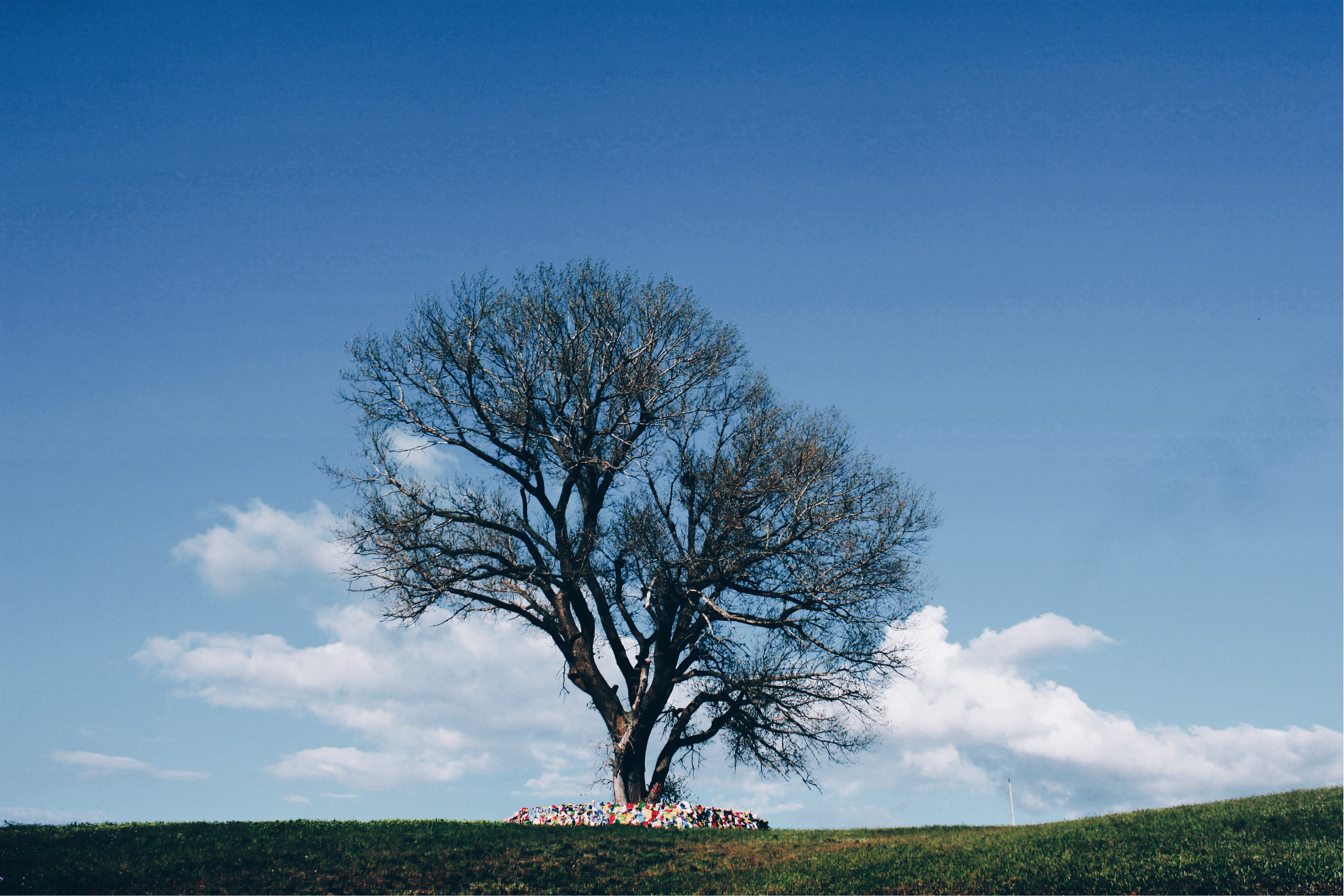 Одинокий тополь с каскадом родников, Целинный район This image is related to the protected area of Russia number 0810019